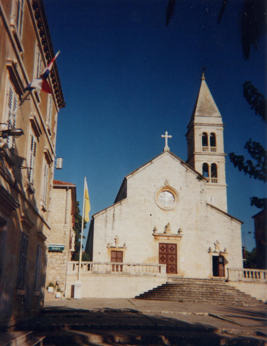 Eglise de Supetar sur l'île Brac, proche du port. À gauche de l'église, le musée de la ville. Dalmatie, Croatie